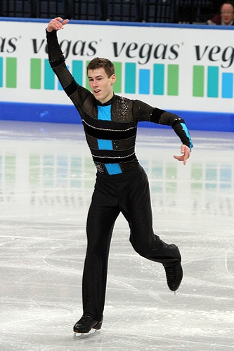 Маттхиас Верслуйс (Финляндия) на чемпионате мира по фигурному катанию среди юниоров 2012